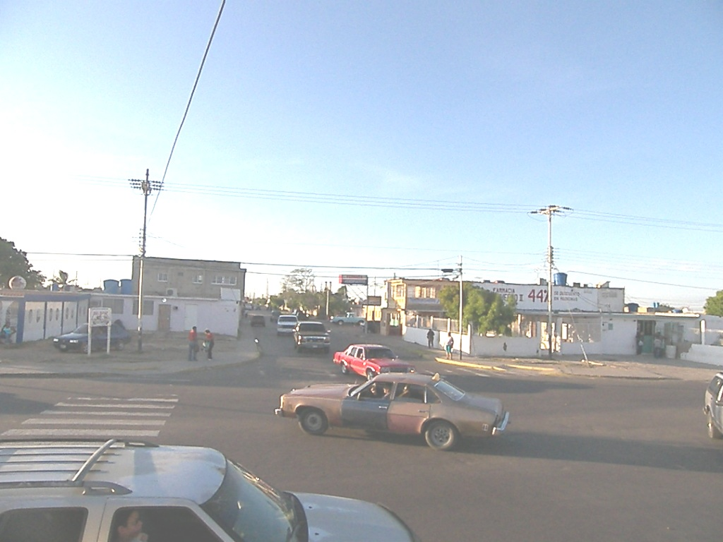 Antiguo Aeropuerto